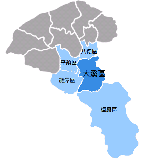 大溪區位置圖